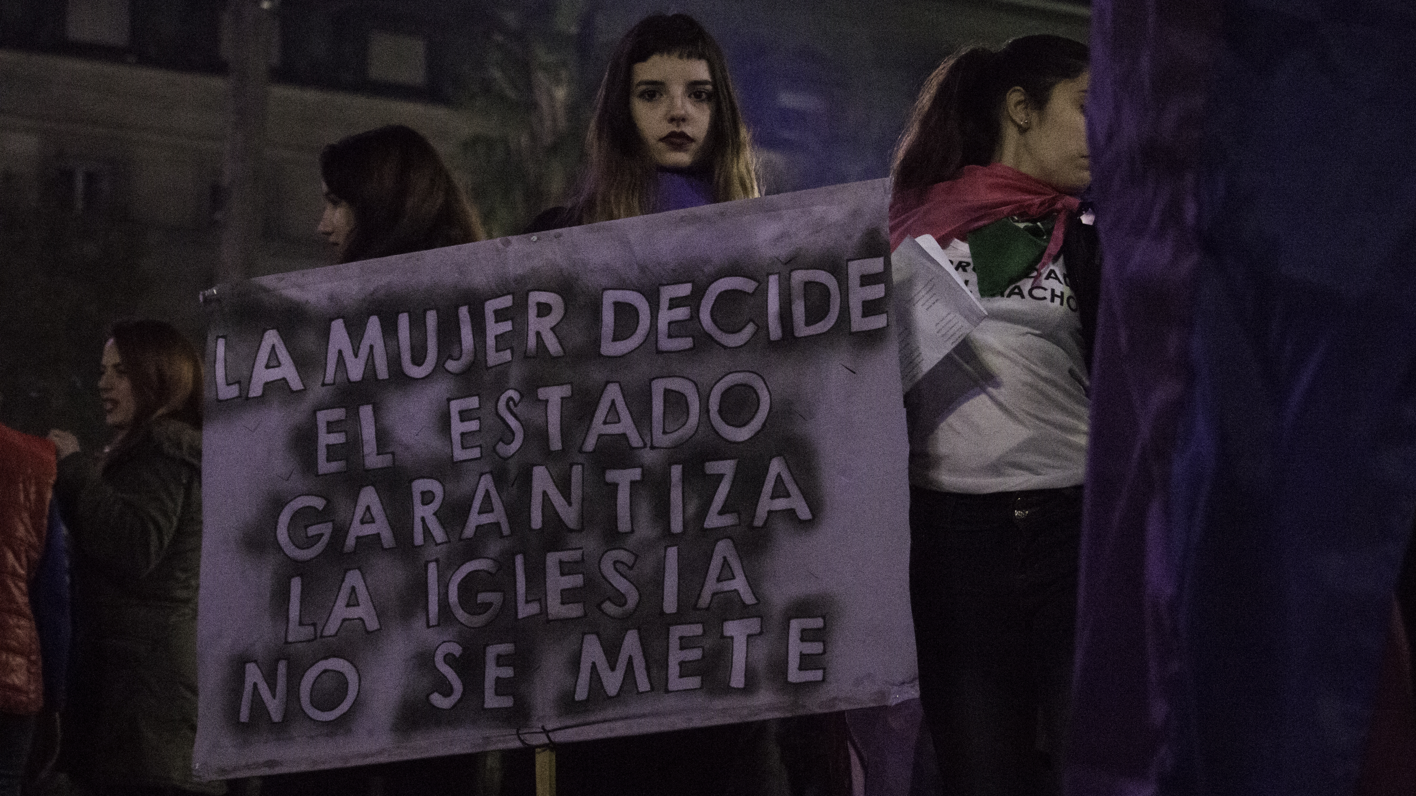 Marcha y performances bajo la consigna "Ni Una Menos", contra la violencia de género. Buenos Aires, Argentina. 3 de Junio de 2017.